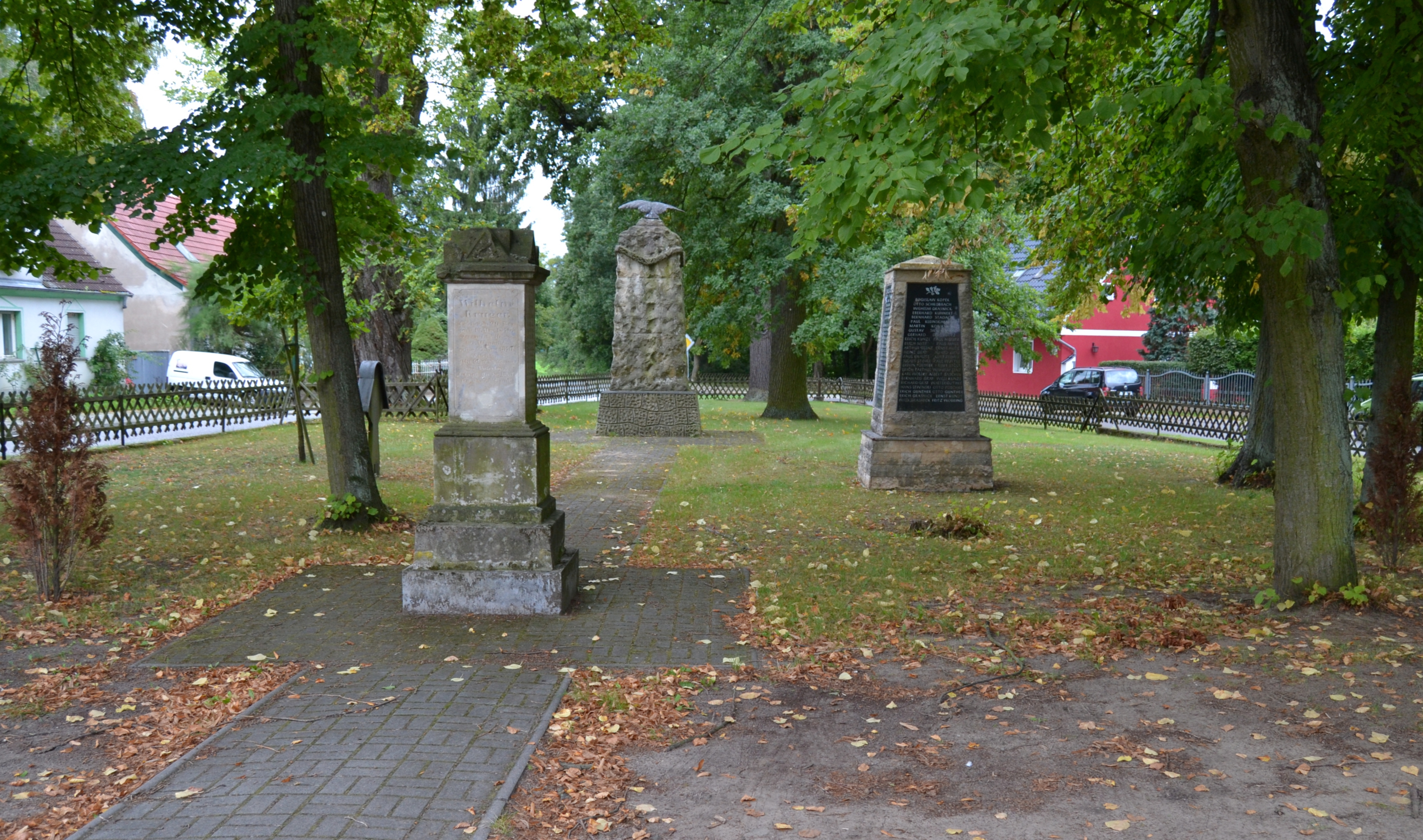 Denkmale in Markgrafpieske